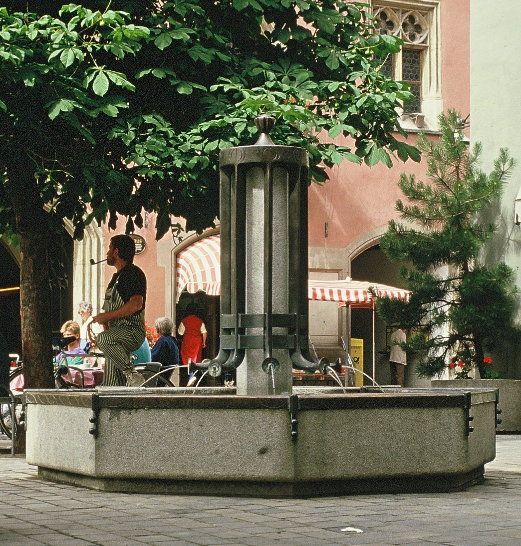 Granit und Bronze 250 cm Durchmesser